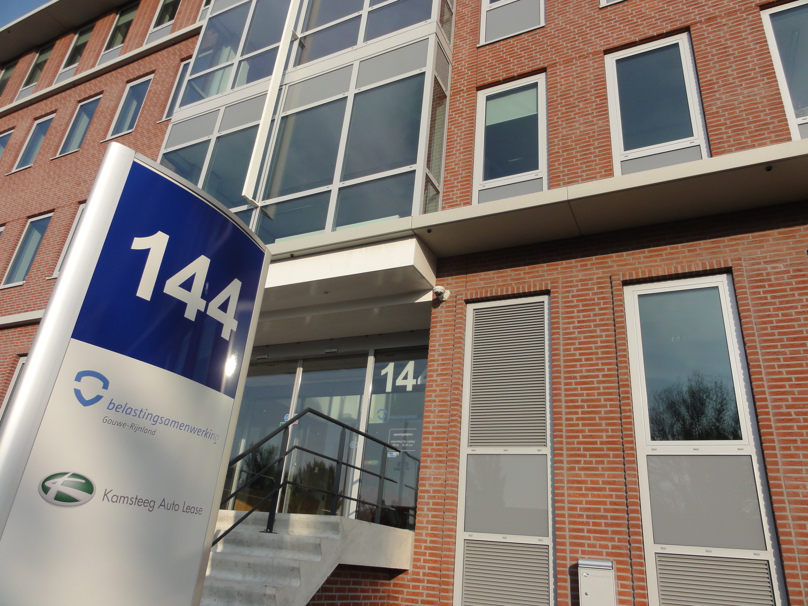 Belastingsamenwerking Gouwe-Rijnland (BSGR), Lammenschansweg 144 in Leiden